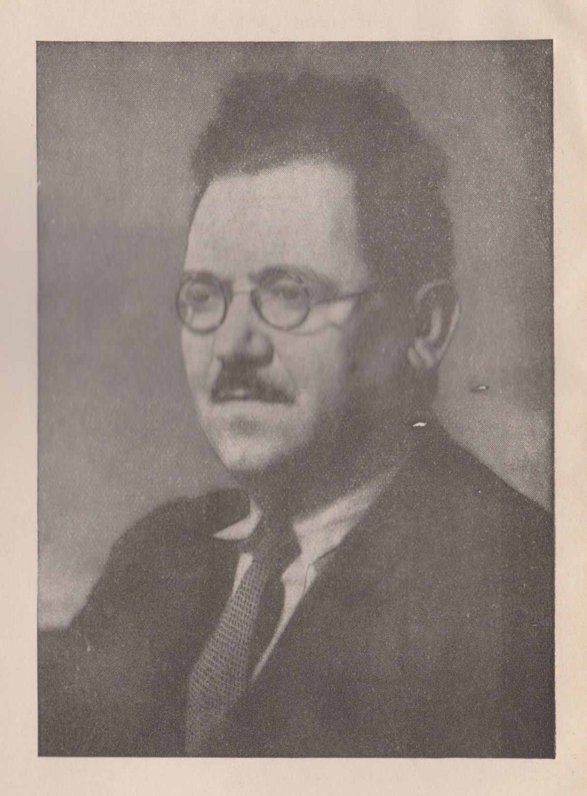 Photo issue du livre "la bataille de la production", édité en 1946. Non créditée